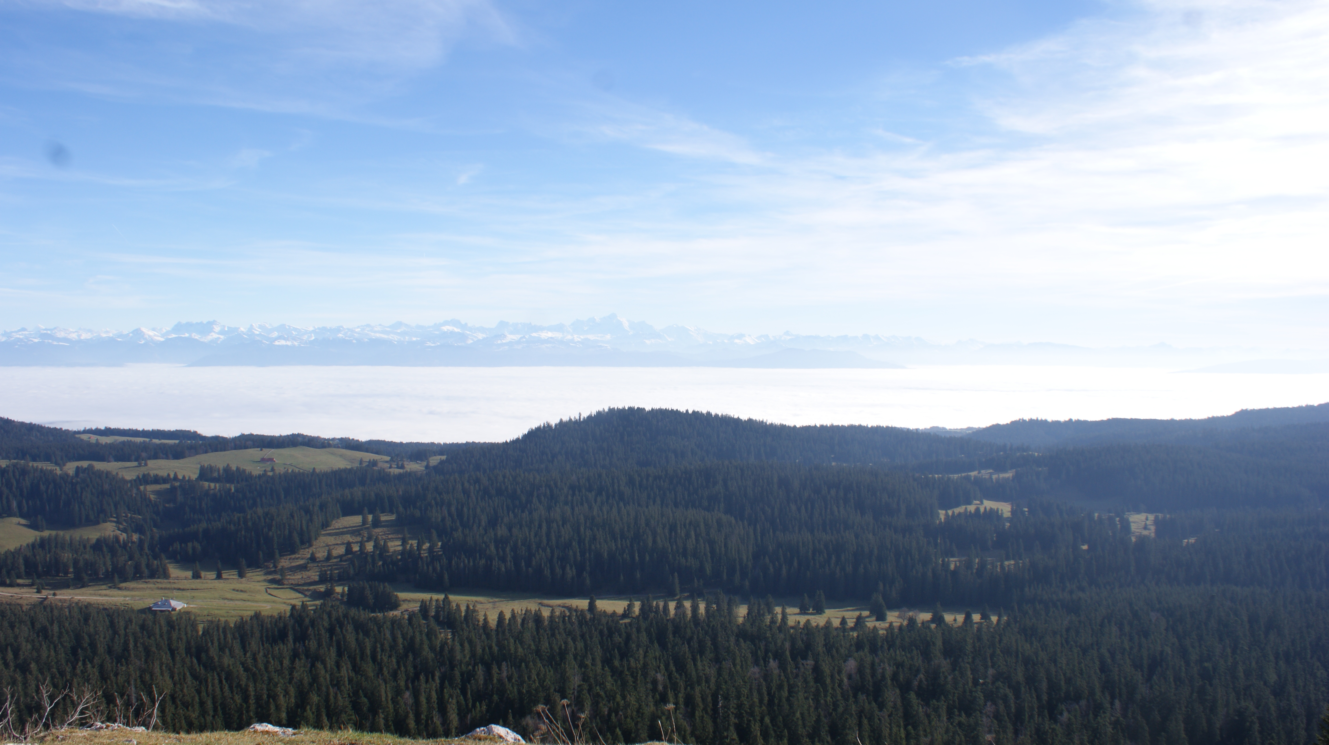 Vue depuis le sommet du Mont Sâla. Le massif des Alpes se détache nettement.